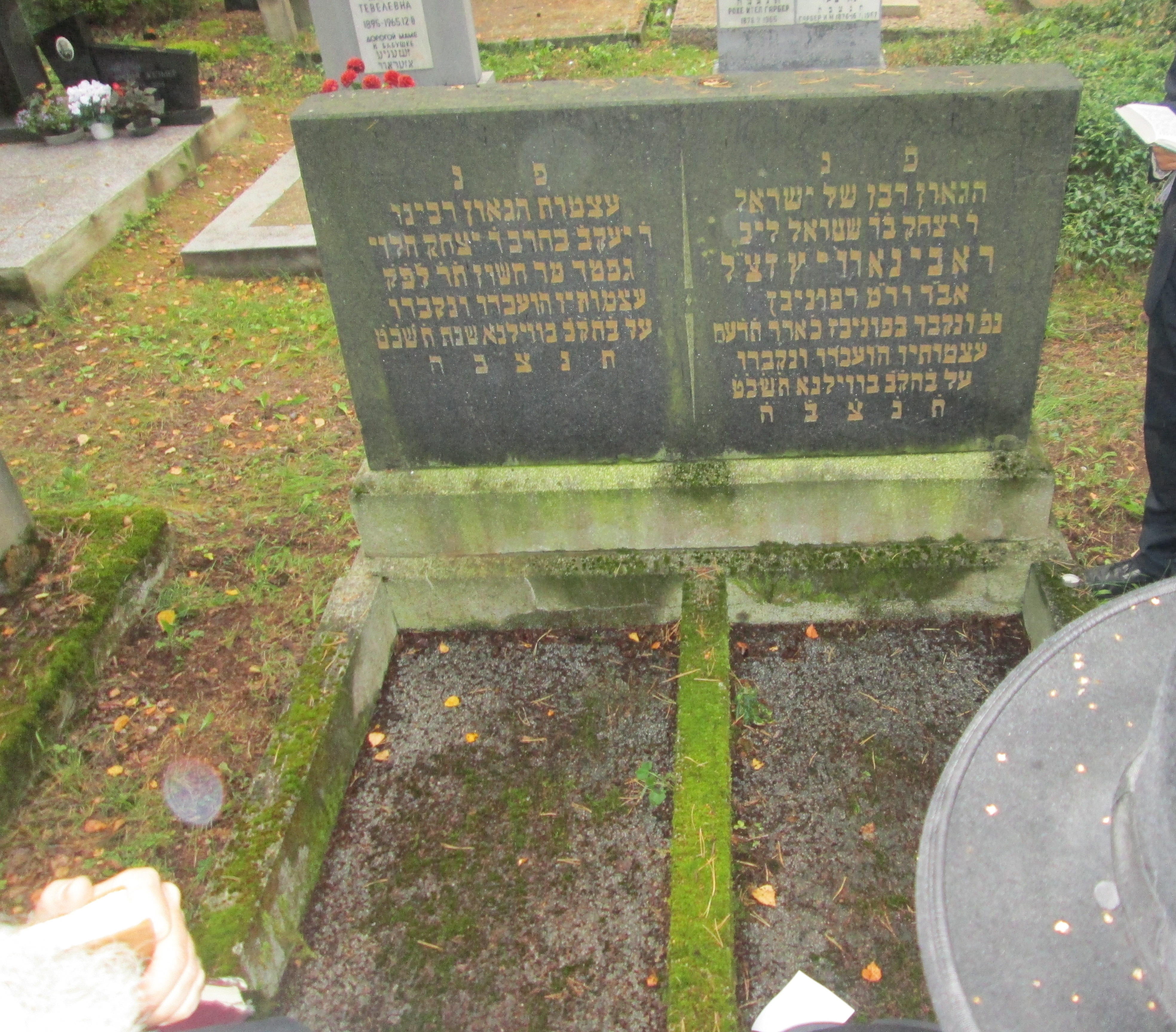 מצבת קברו של רבי יצחק רבינוביץ בבית הקברות היהודי בוילנא